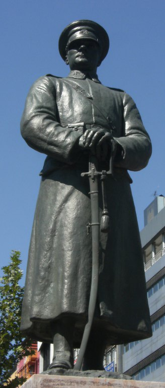 Ankara Zafer Meydanı'nda bulunan Mareşal Atatürk Anıtı